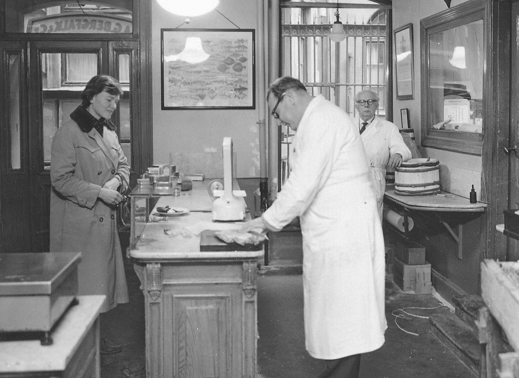 Fotografiet är taget med självutlösare och fotografen, Margareta Cramér, står som "kund" i affären